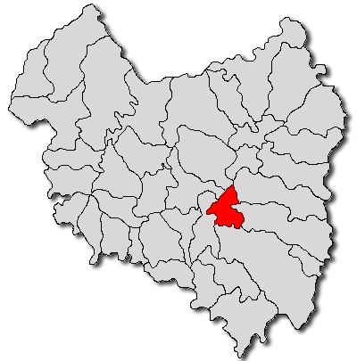 Categorie:Hărţi ale judeţului Covasna